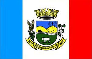 bandeira do município de Santana da Boa Vista